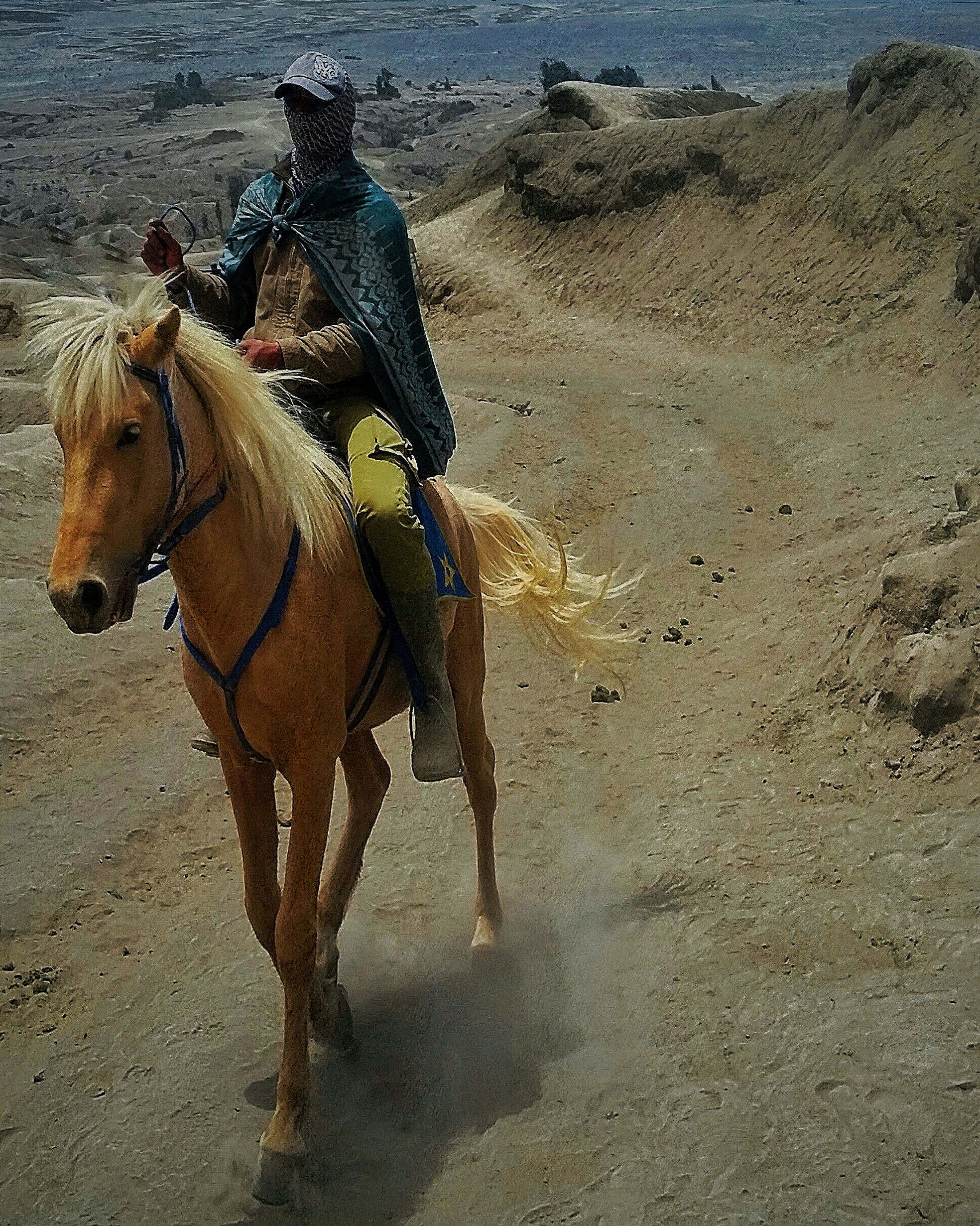 Semacam rindu yang ingin segera terobati, Semacam hilang fokus untuk berpaling. Mungkin di seluruh tubuh hingga pembuluh hati ini sudah terhipnotis oleh pemandangan-nya yang begitu eksotis. Atau mungkin sejak lahir jiwa yang ada pada diri ini sudah tertanam sebagai seorang yang berjiwa petualang. Belum tercapainya suatu kepuasan karena satu hal, Yaitu masalah WAKTU. Mengexplore sebuah wisata, Bukan sebatas terpusat di satu titik lokasi. Namun, ingin rasanya mengetahui lebih rinci hingga di dalam-nya, Tentang sebuah legenda, suku dan budaya yang sudah melekat sejak dahulu kala. Satu hal yang ingin aku sampaikan, TAMAN NASIONAL BROMO TENGGER SEMERU, Keindahanmu membuatku candu 😍😍😍